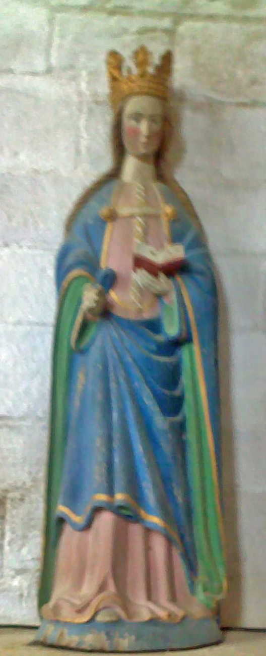 Pluneret (Morbihan, France), chapelle Sainte Avoye, statue de Sainte Avoye en bois polychrome.